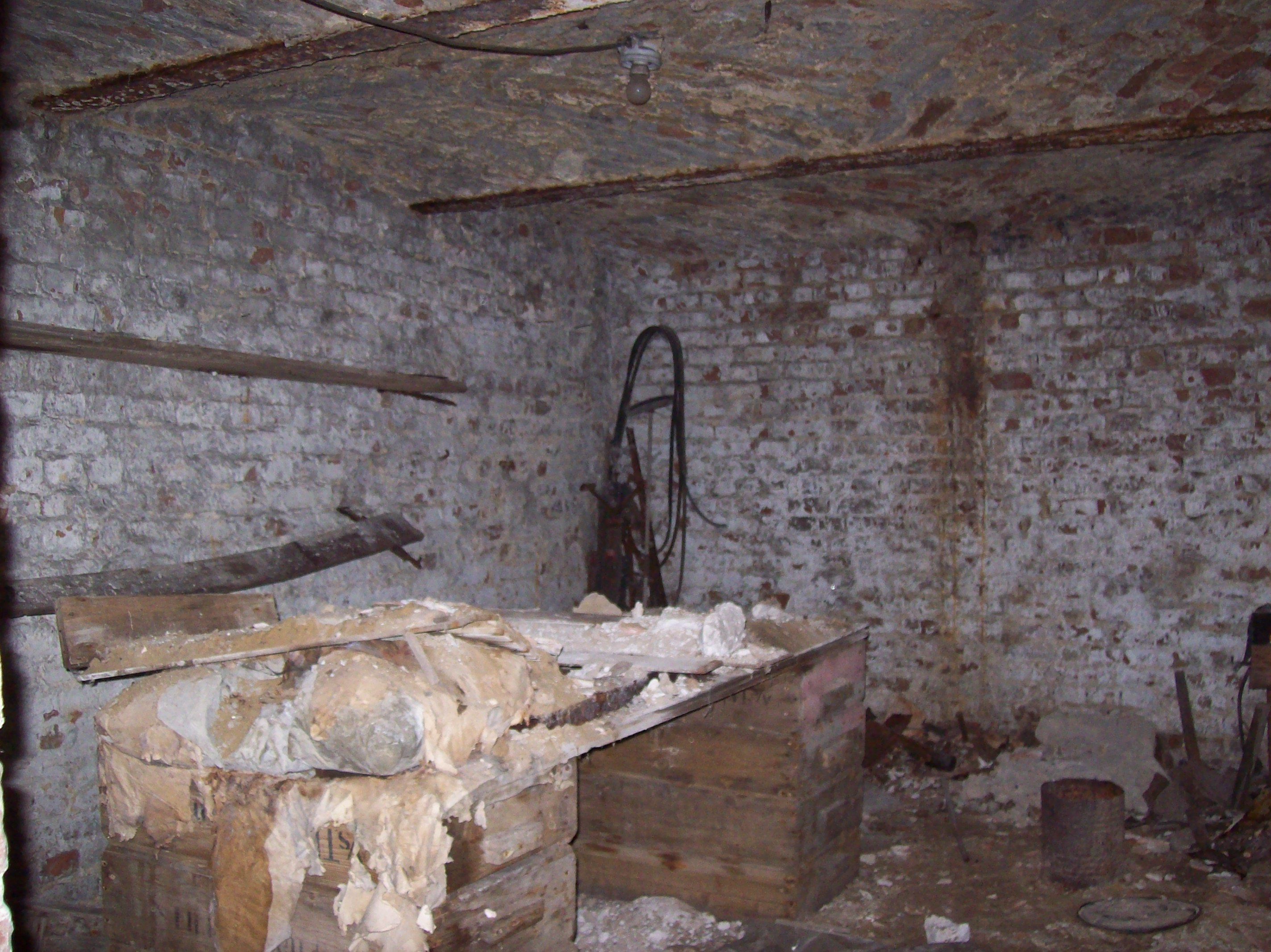 Denkmalgeschütztes Objekt Deutschland Berlin Nummer 09030386 Koloniestraße 57 Erdkeller innen